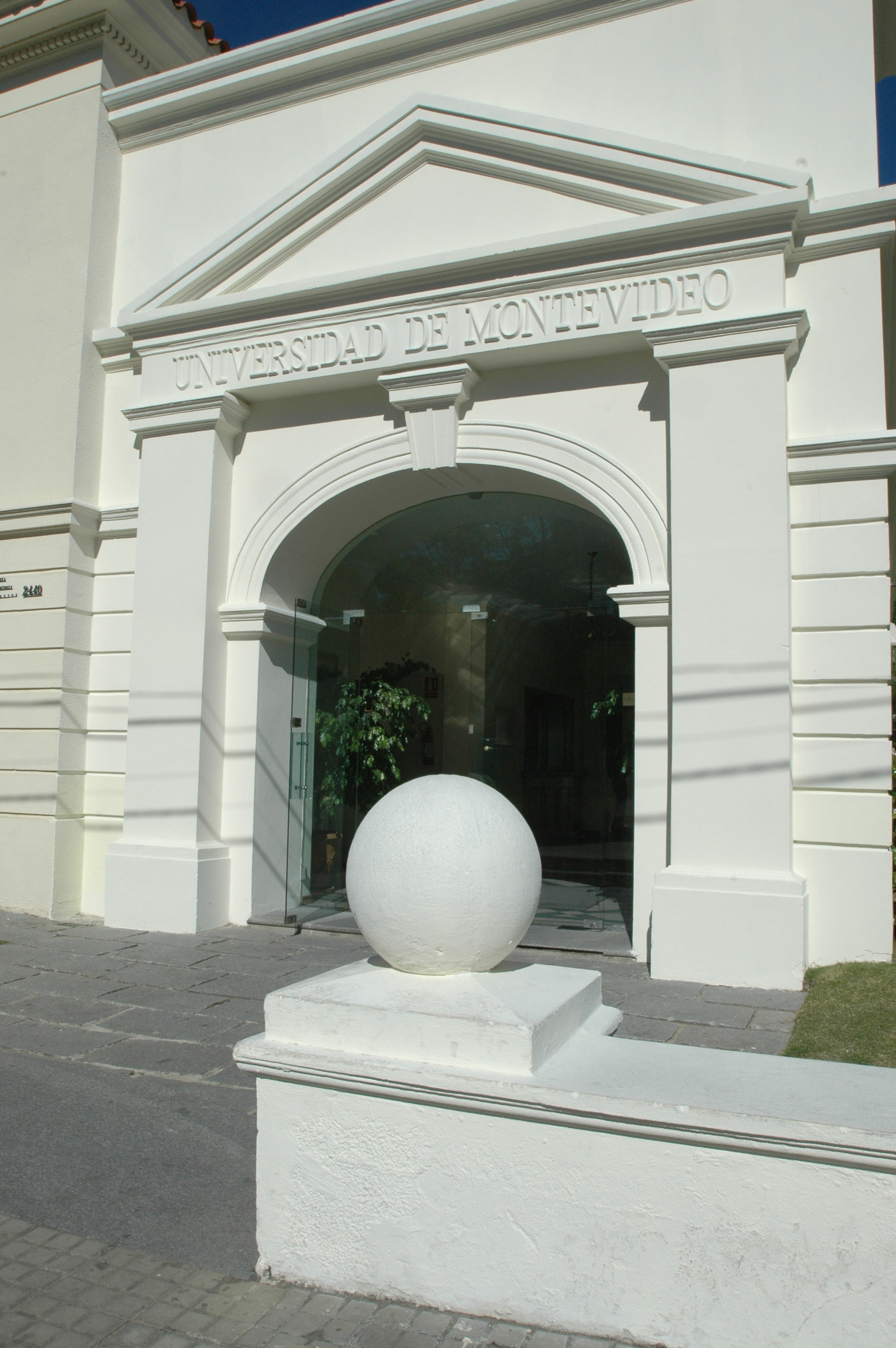 Fachada Sede Central de la UM